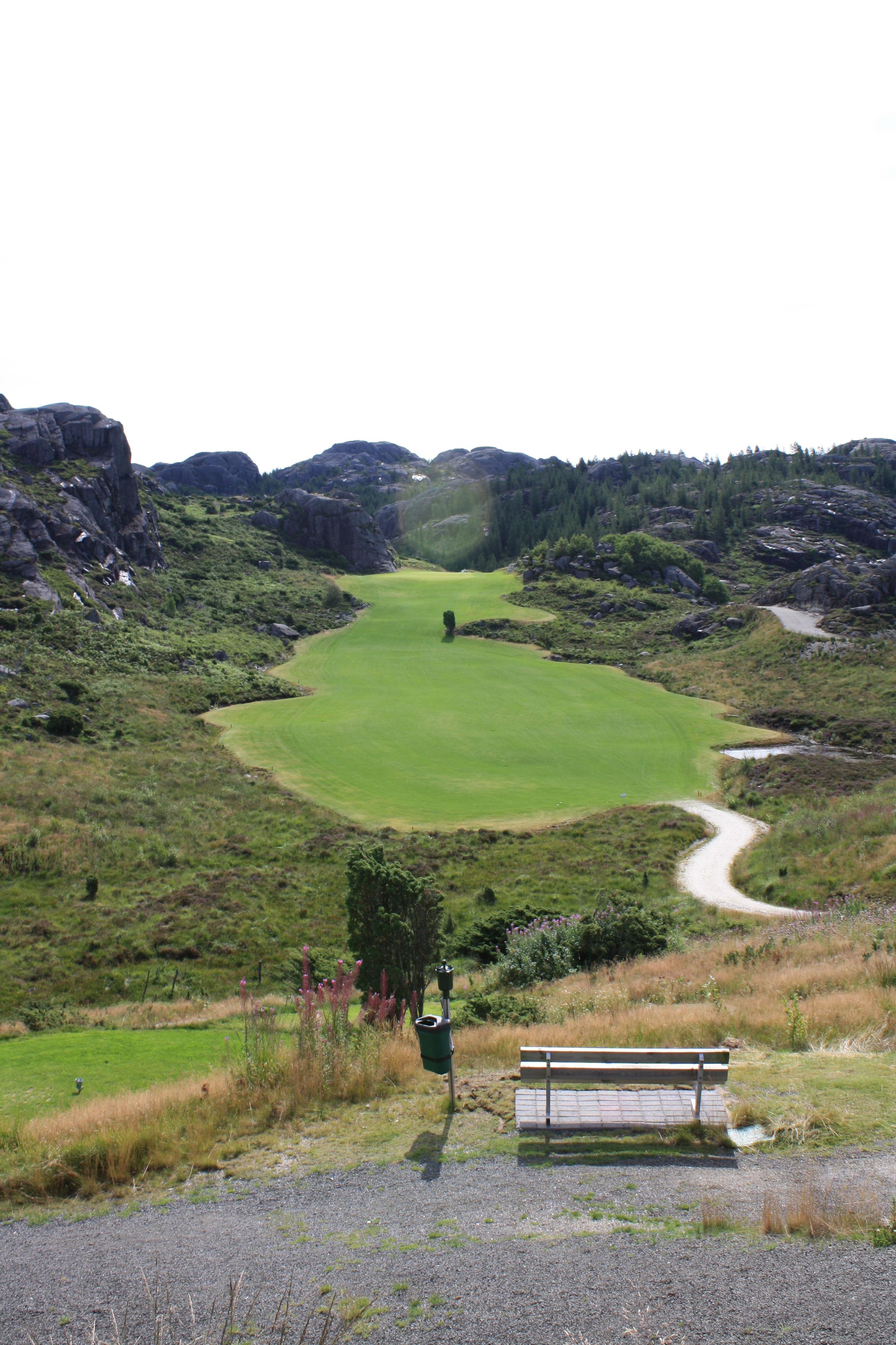 Hull 3 i Maurholen golfpark